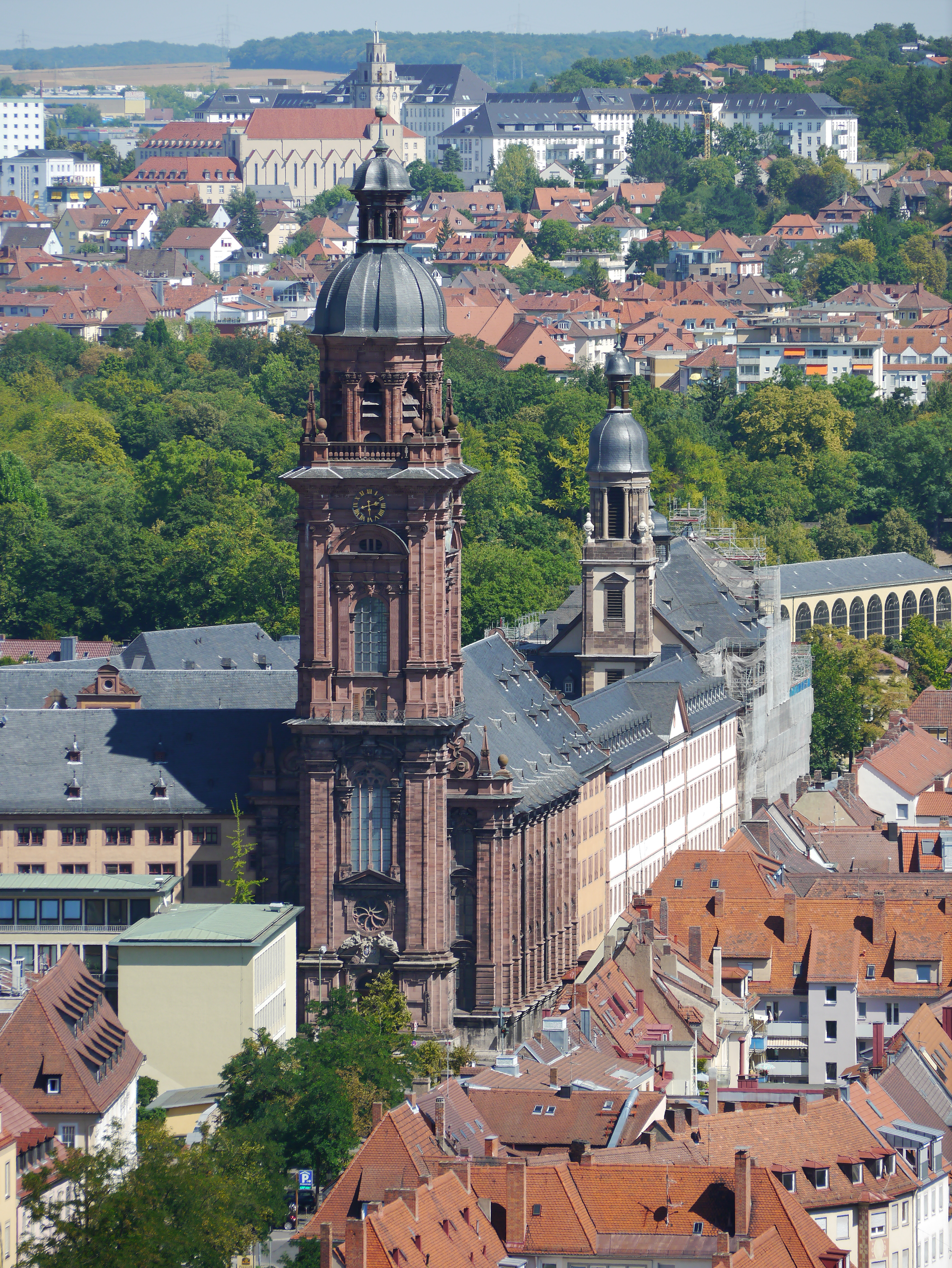 Neubaukirche von der Marienfest aus gesehenThis is a photograph of an architectural monument.